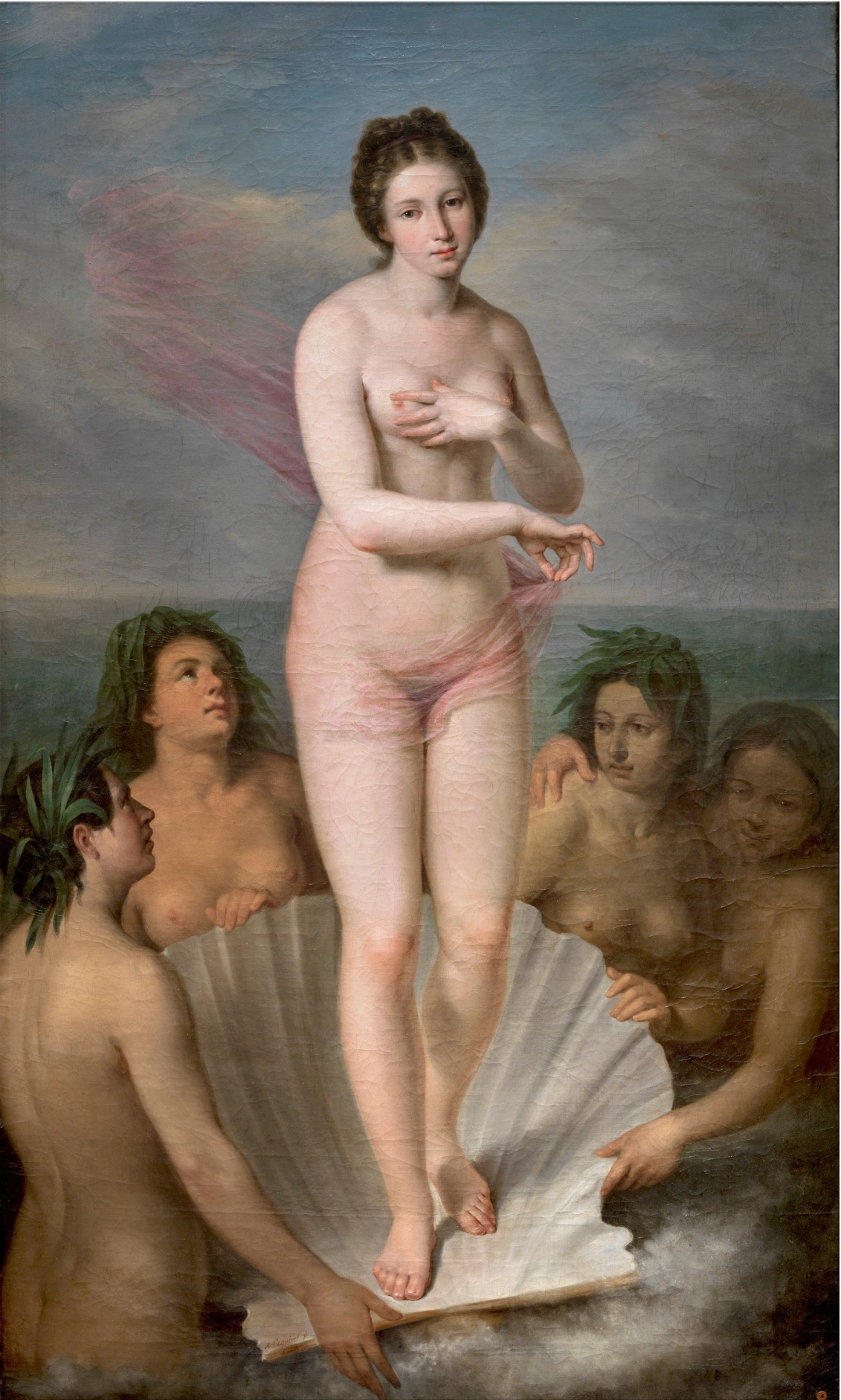 La obra representa el nacimiento de la diosa Venus, y es considerada por algunos autores como el mejor desnudo femenino de la pintura romántica española.